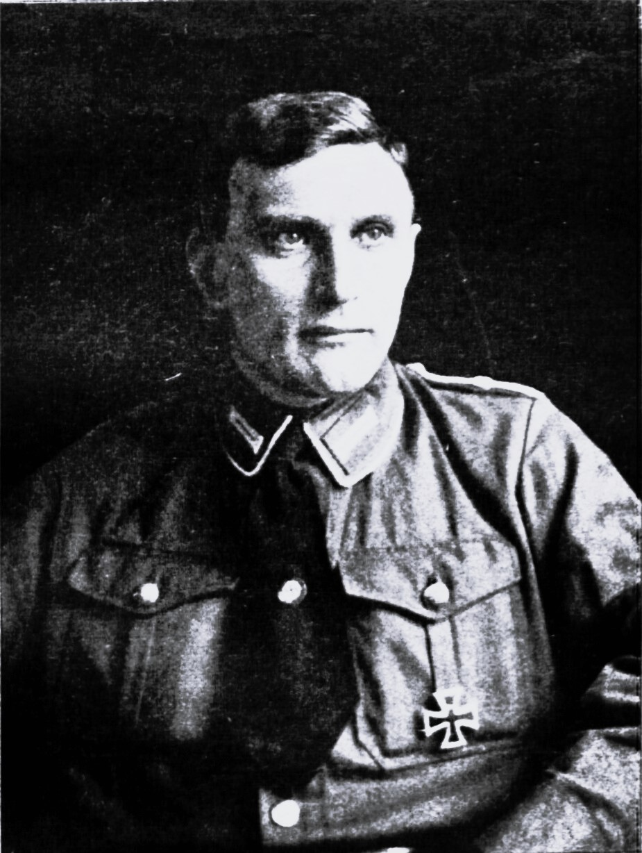 Dr. Böltzer, Reihskommissar für Lübeck.